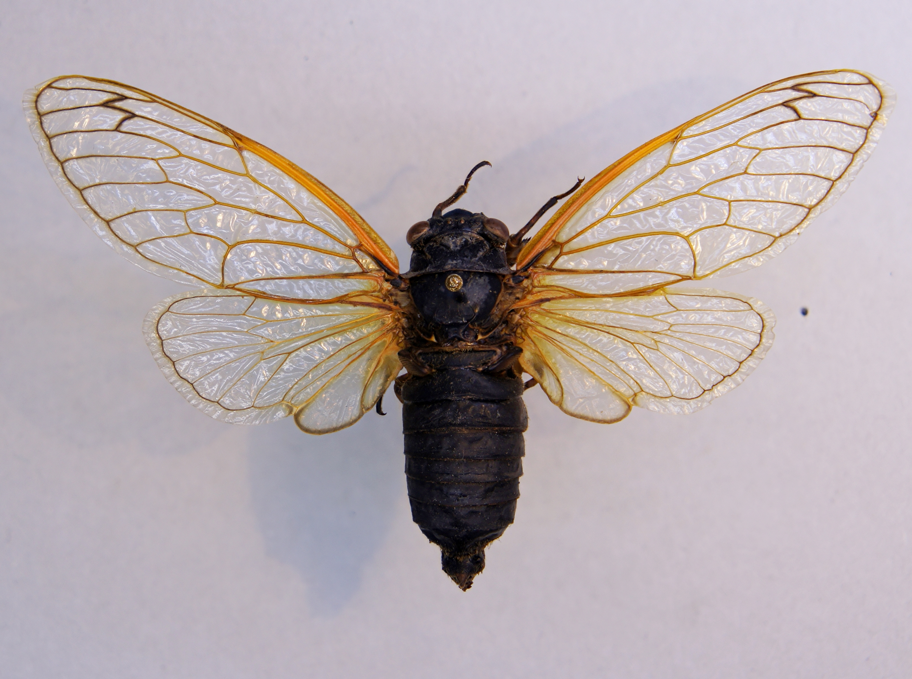 Magicicada septendecim (Linné, 1758) Herkunft: USA, Princeton, New Jersey